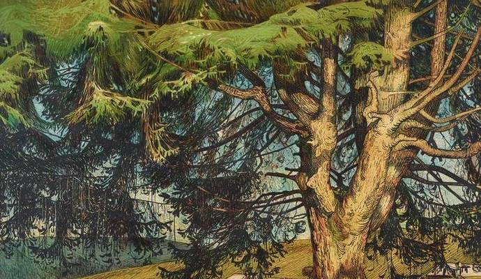 Schwarzwaldtanne